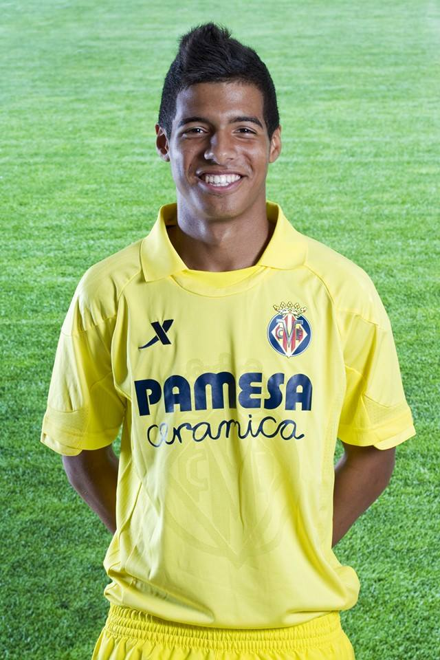 Carlos Villareal C